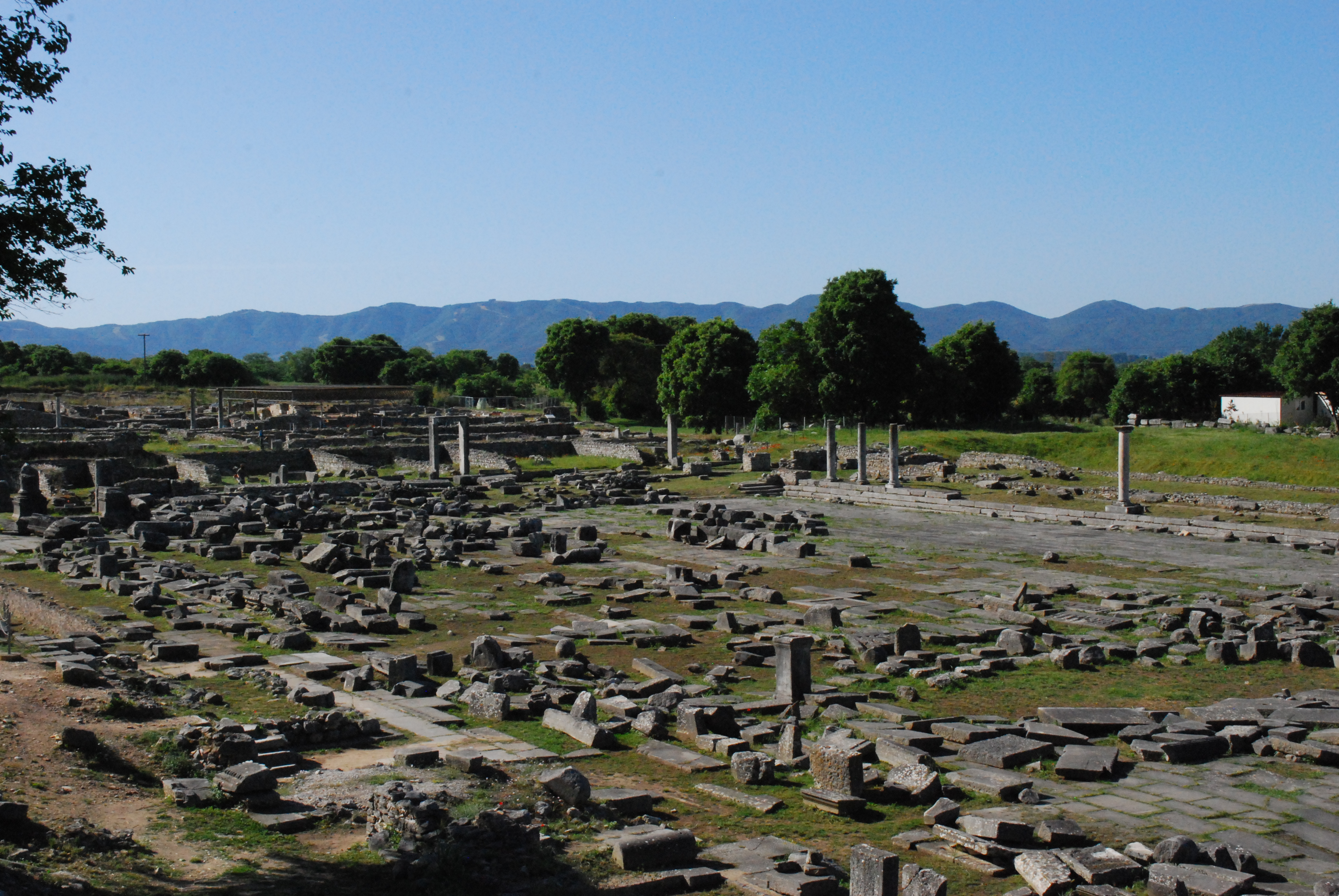 Vue du site archéologique de l'ancienne ville de Philippes, près de Kavala, en Macédoine (Grèce).